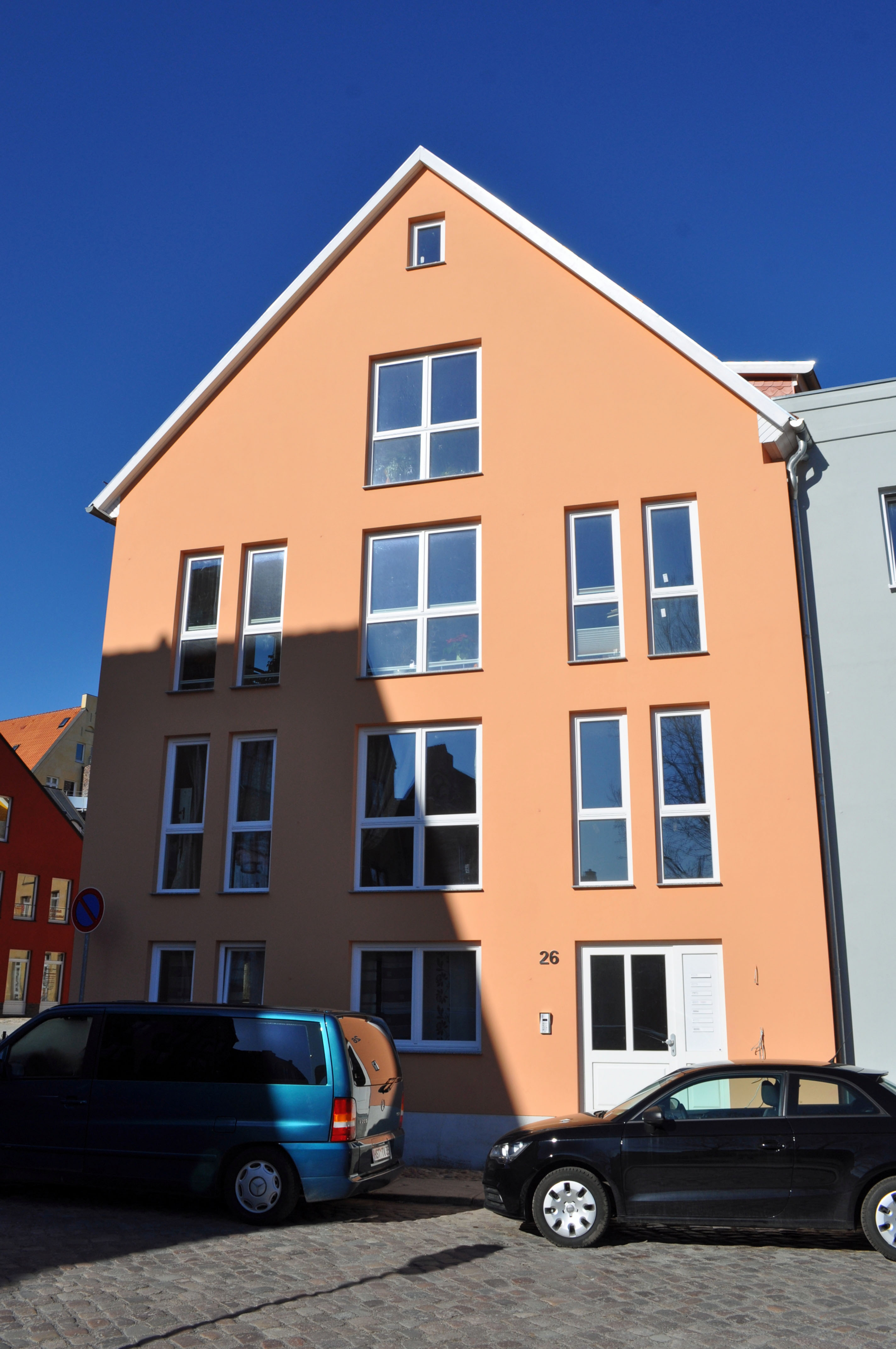 Gebäude bzw. Gebäudedetail in Stralsund. Straße und Hausnummer siehe Dateiname.